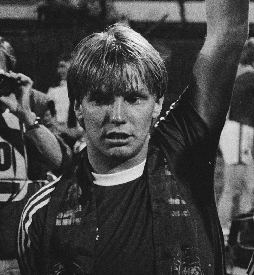 Collectie / Archief : Fotocollectie Anefo Reportage / Serie : [ onbekend ] Beschrijving : FC Bayern Munchen tegen Aston Villa 0-1 Europa Cup I blijde Aston Villa spelers met de Cup Datum : 26 mei 1982 Trefwoorden : sport, voetbal Persoonsnaam : Aston Villa, CUP, FC Bayern Munchen Fotograaf : Antonisse, Marcel / Anefo Auteursrechthebbende : Nationaal Archief Materiaalsoort : Negatief (zwart/wit) Nummer archiefinventaris : bekijk toegang 2.24.01.05 Bestanddeelnummer : 932-1813